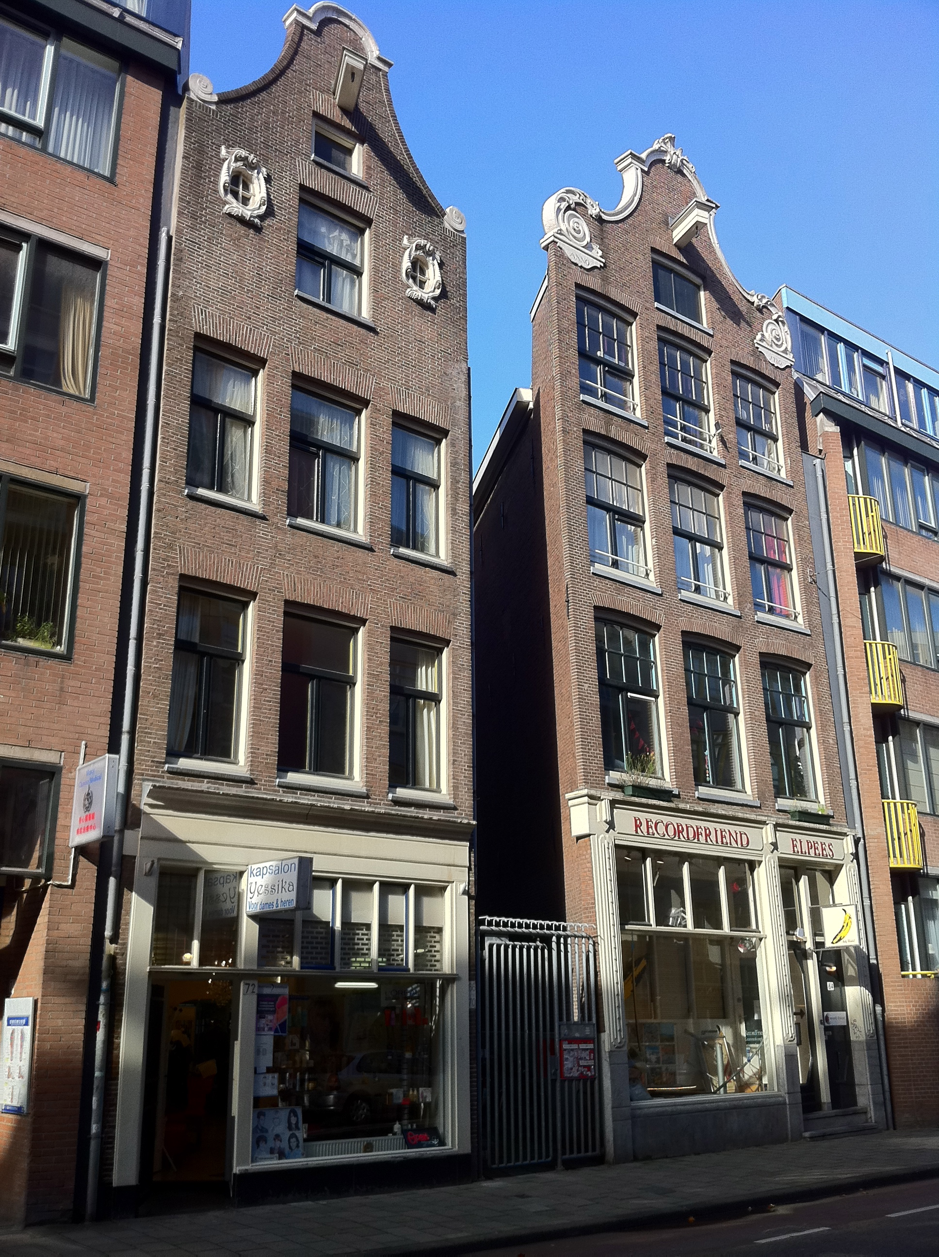 Foto gemaakt in het centrum van Amsterdam - Sint Antoniesbreestraat 64-72